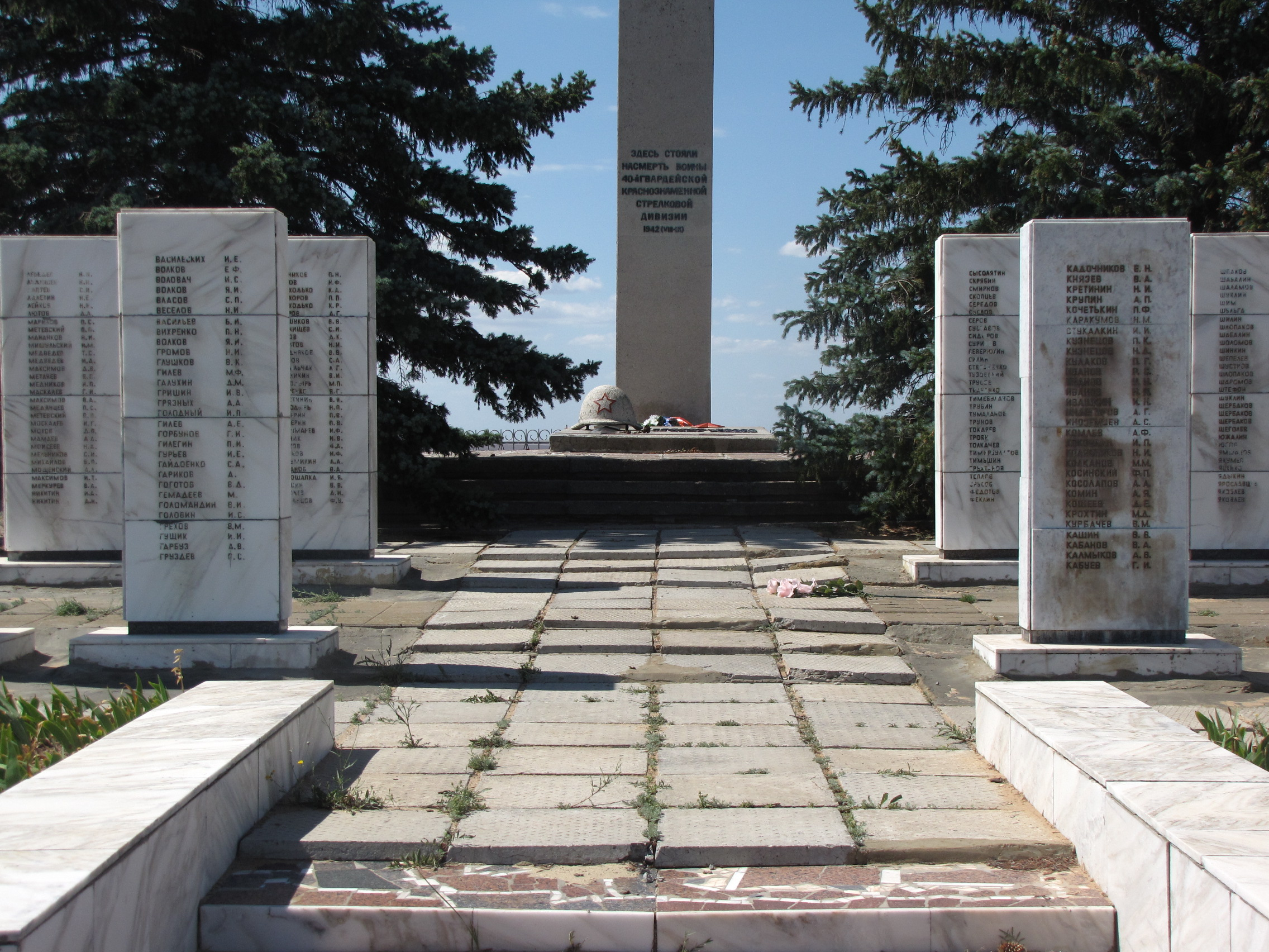 Высота 180,9. Мемориальный комплекс 40-й гвардейской стрелковой дивизии.